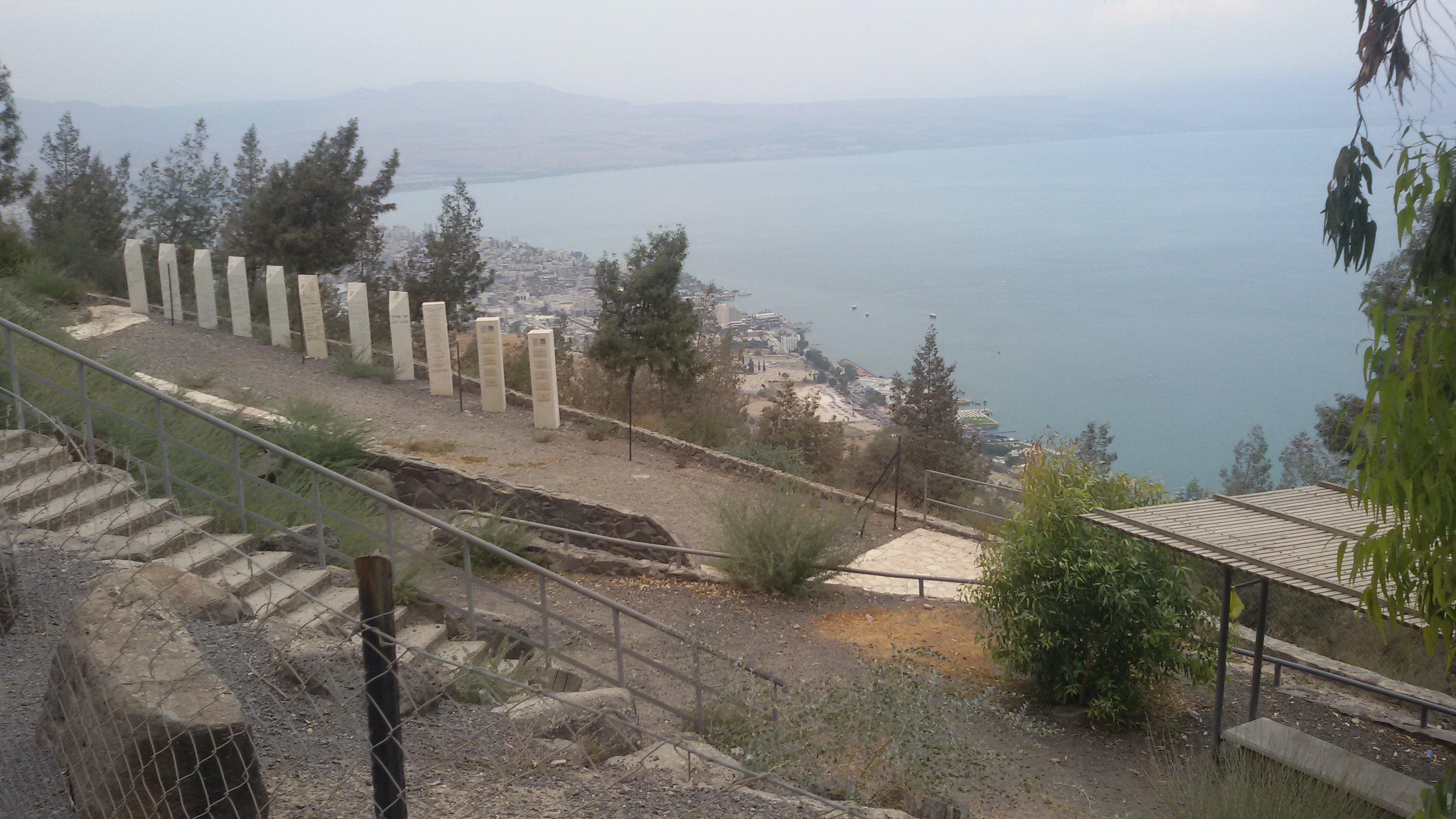 אנדרטה ביער שווייץ